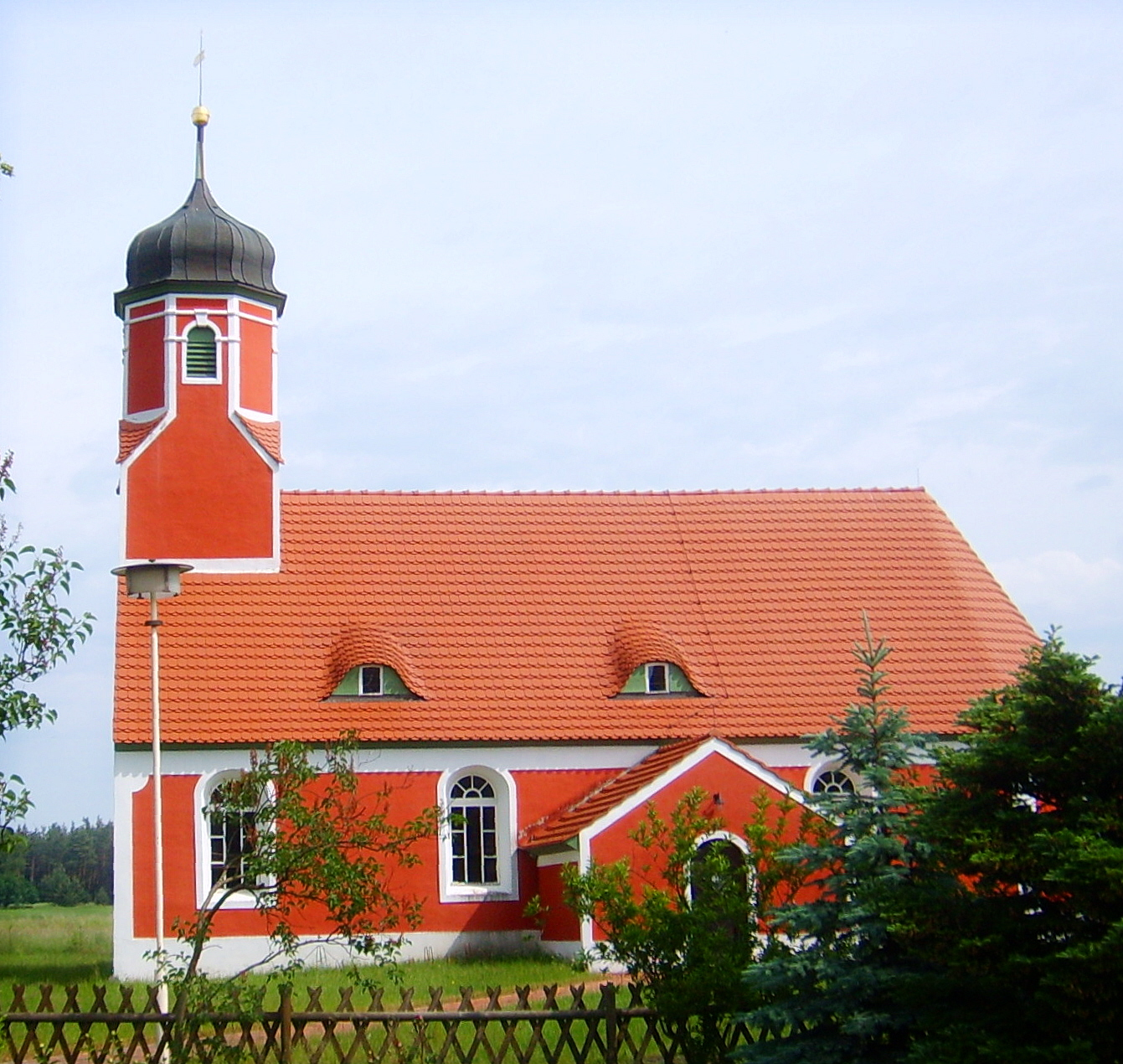 Dorfkirche Rückersdorf, Deutschland.